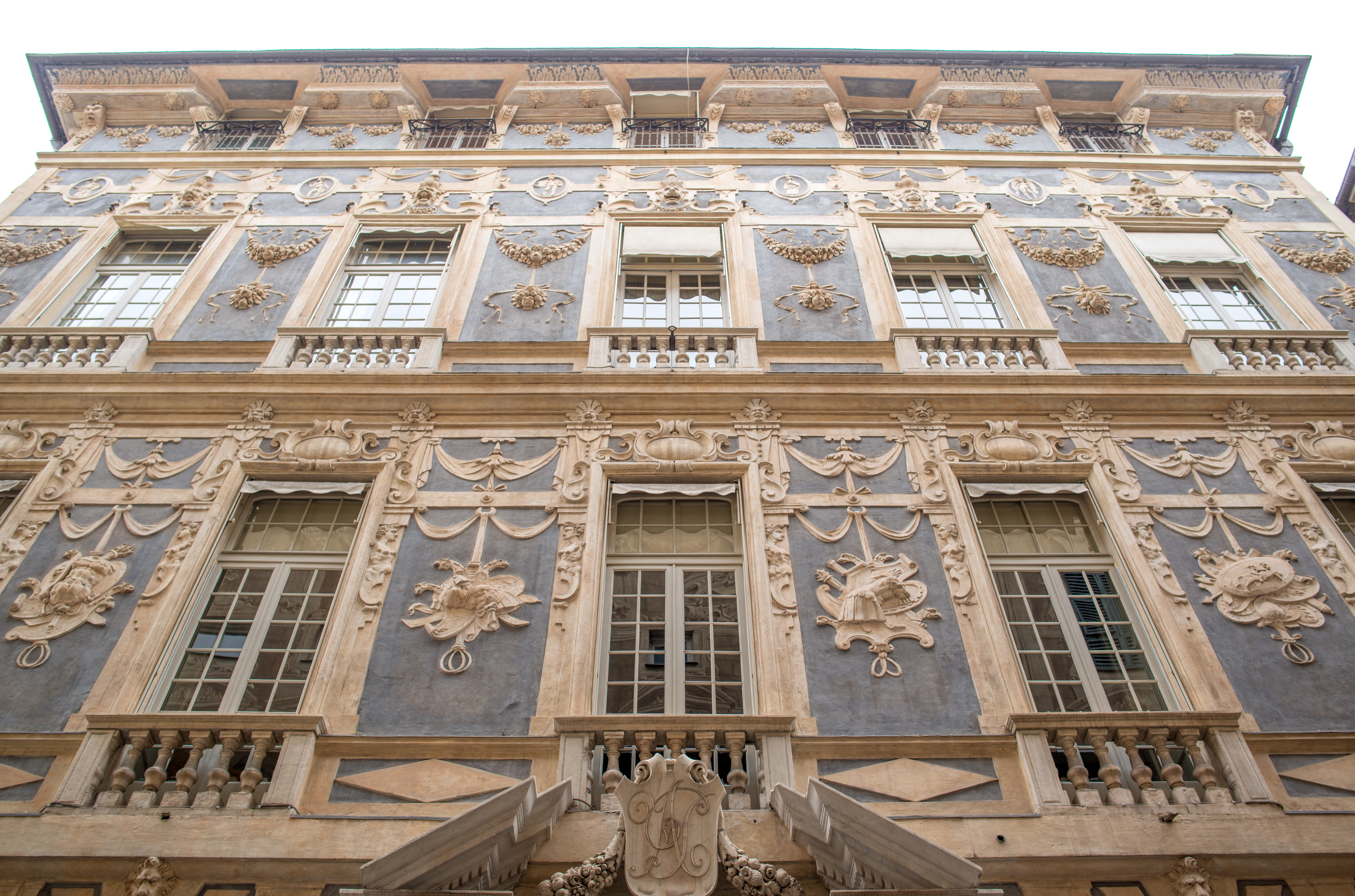 Genoa, Italy, Nicolosio Lomellini Palace